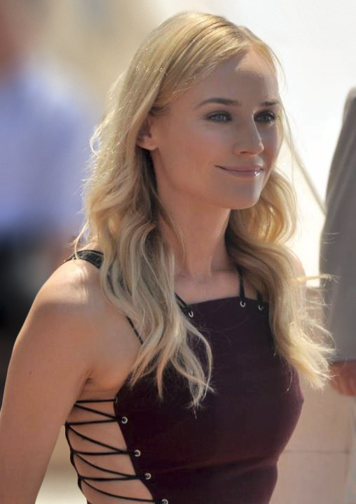 Diane Kruger au festival de Cannes